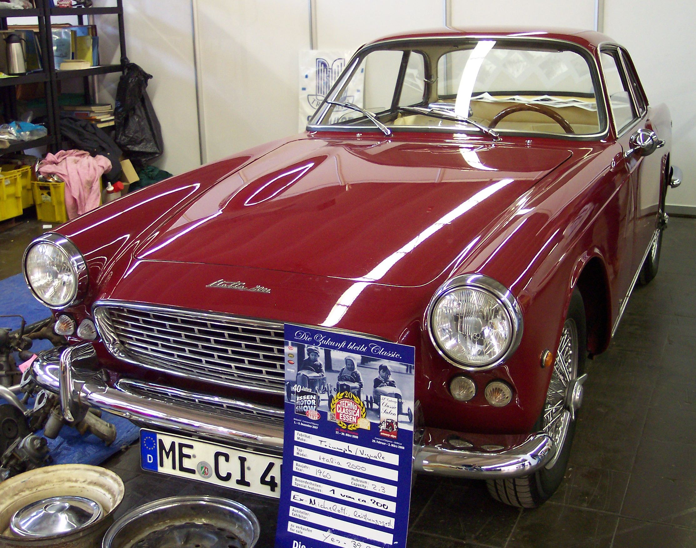 Triumph Vignale Italia 2000